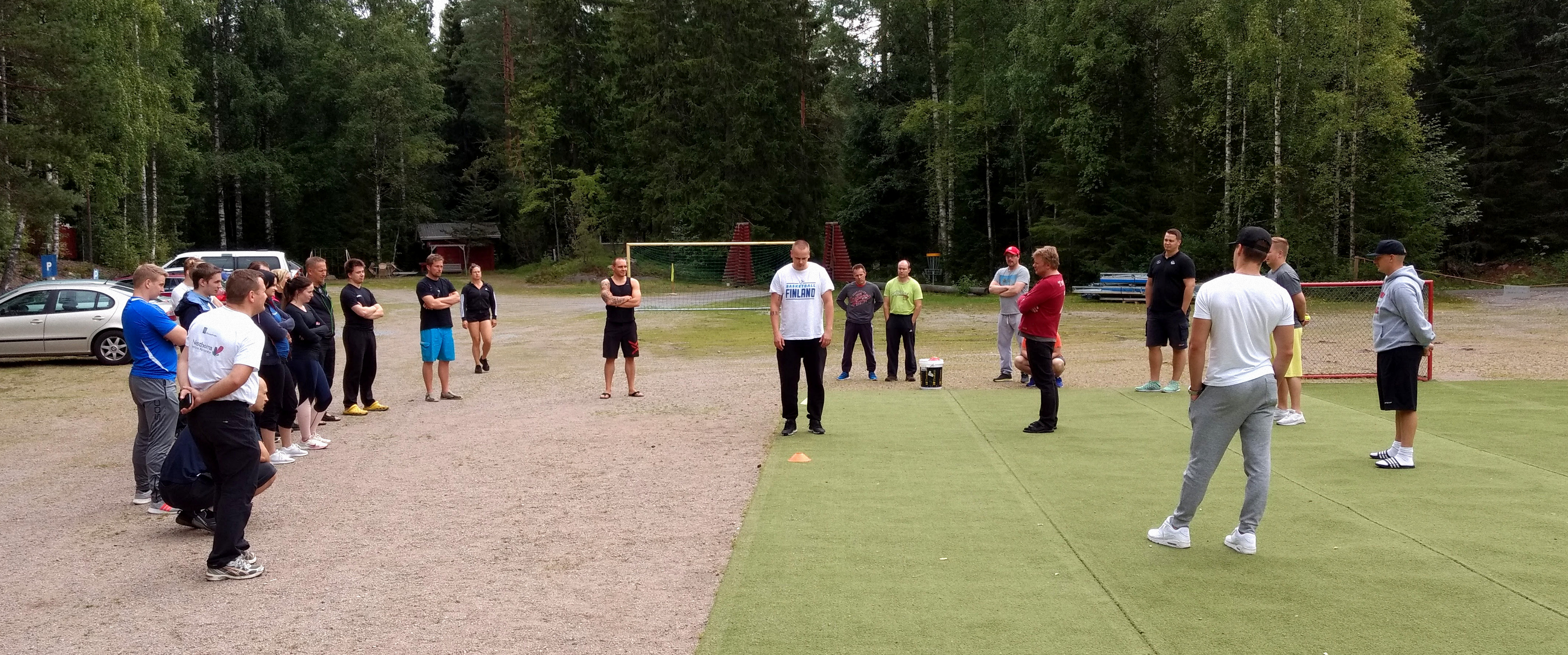 Valmentajien ammattitutkinnon opiskelijoita Varalan urheiluopistossa, Tampereella. Opettajana valmentaja Marko Malvela (punainen paita).